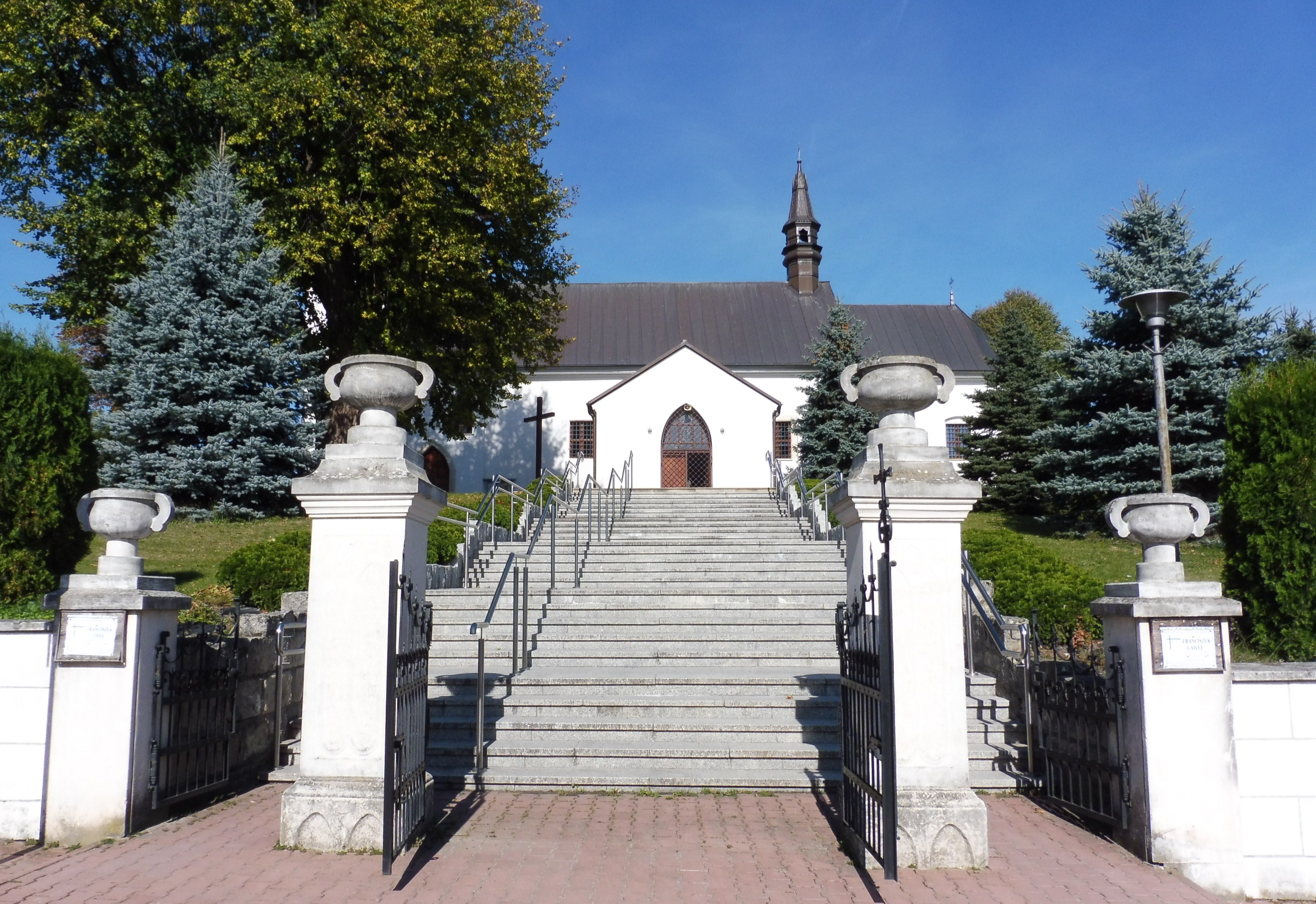 Pałecznica - rzymskokatolicki kościół parafialny pw. św. Jakuba Apostoła